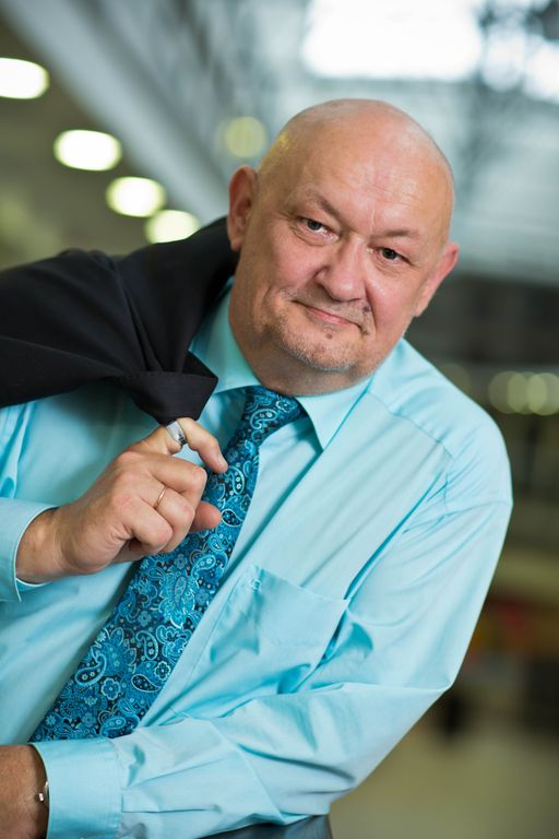 Vanemuise teatri endine direktor Mart Raik, oktoober 2012. Foto: Egert Kamenik.